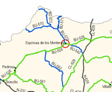 Vista aumentada del Plan de Carreteras de la Junta de Castilla y León 2008-2020.